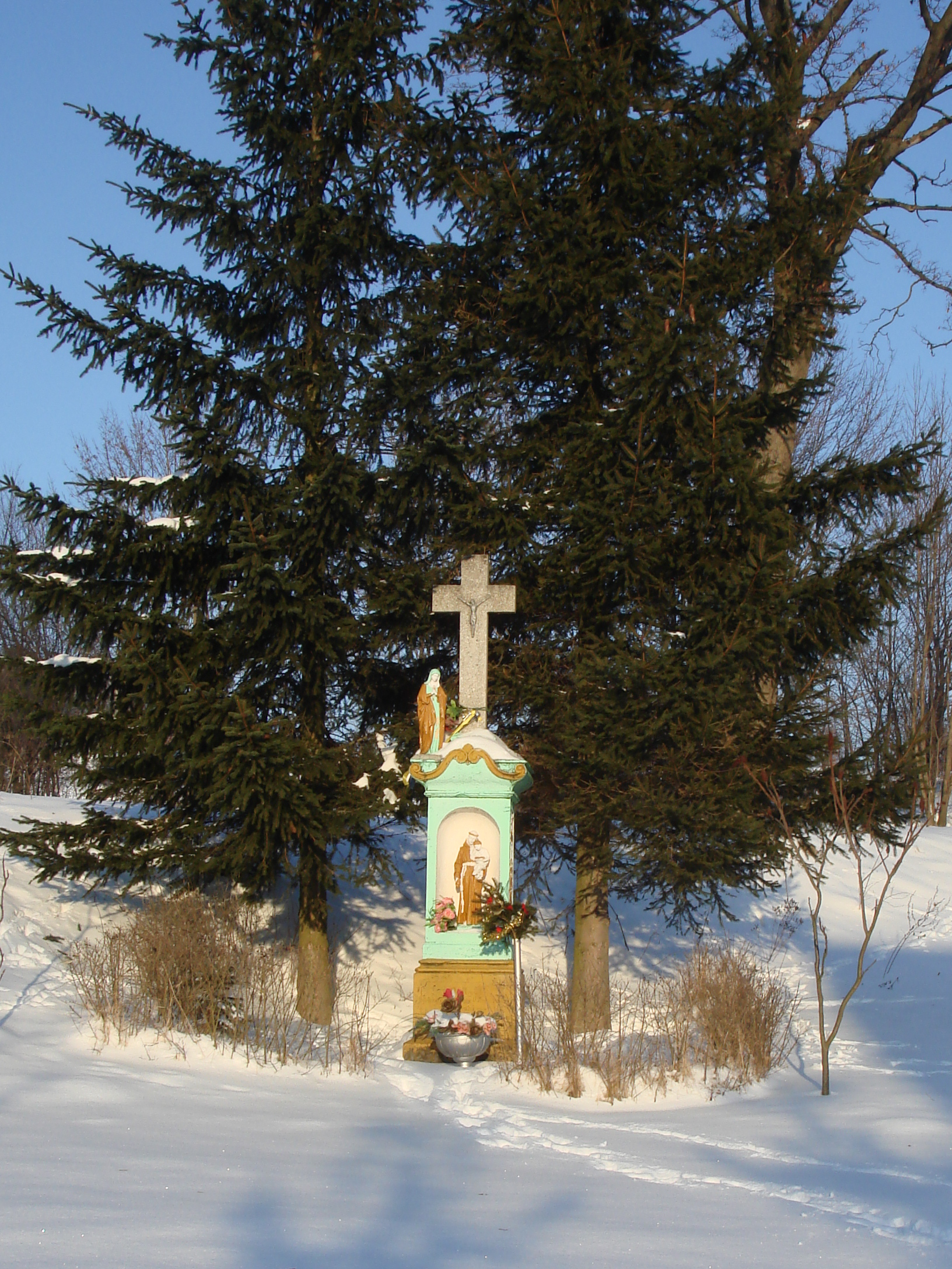 Przedwojów, kapliczka św. Antoniego